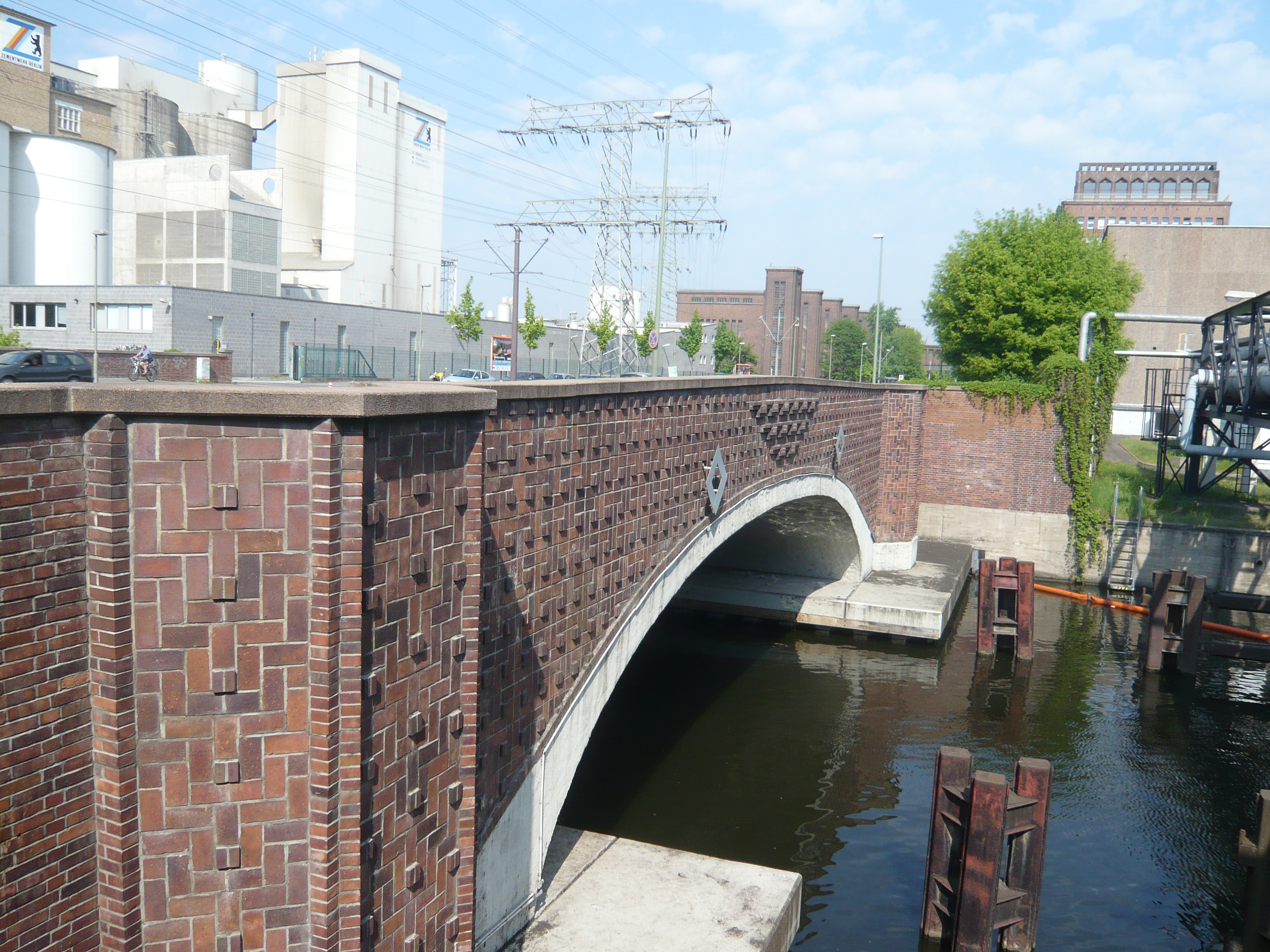 Klingenbergbrücke über Stichkanal, im Hintergrund Verwaltungsgebäude des Kraftswerks, rechts Versorgungsleitungen, links Zementwerk Berlin